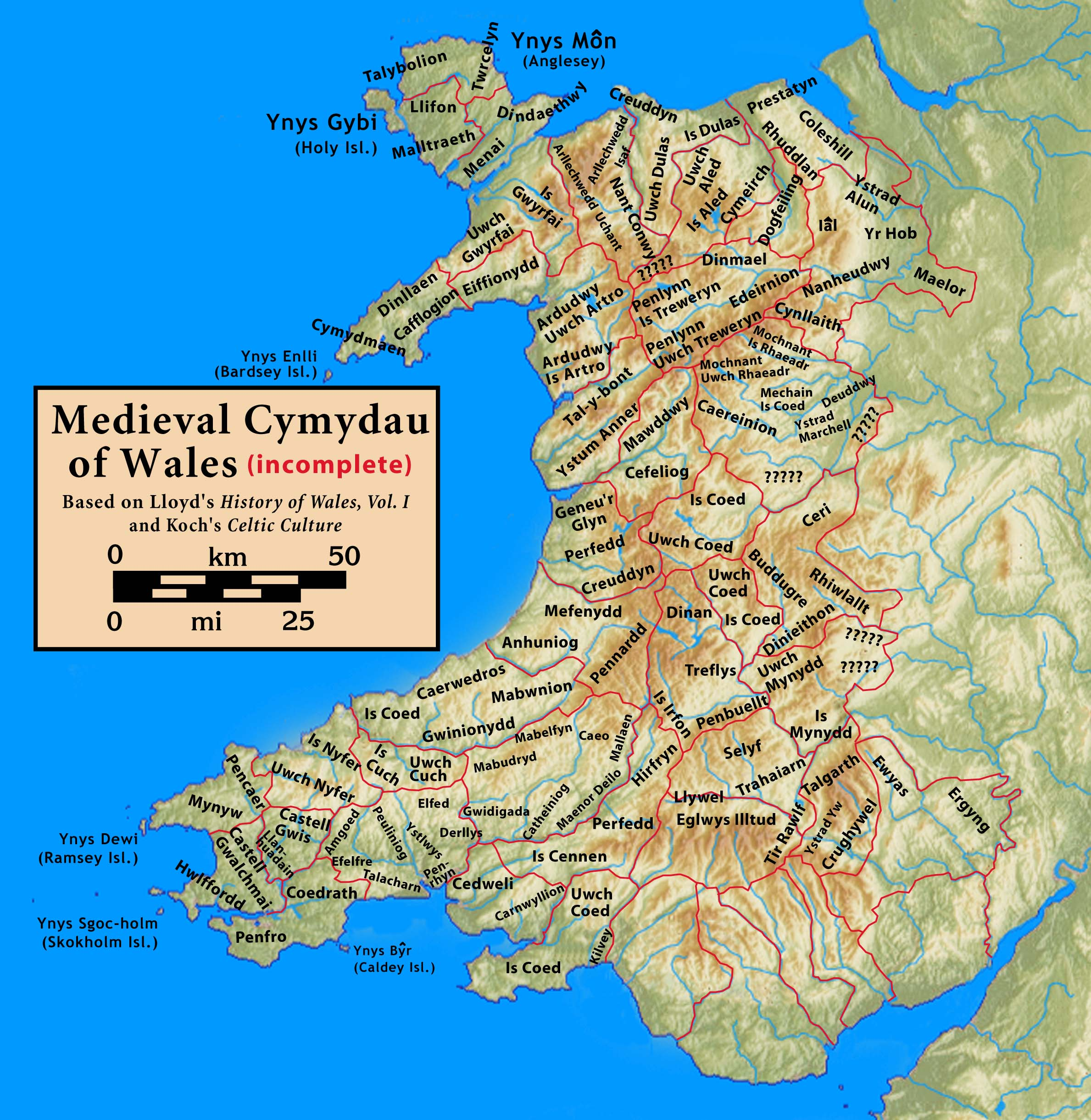 Cymydau of Medieval Wales